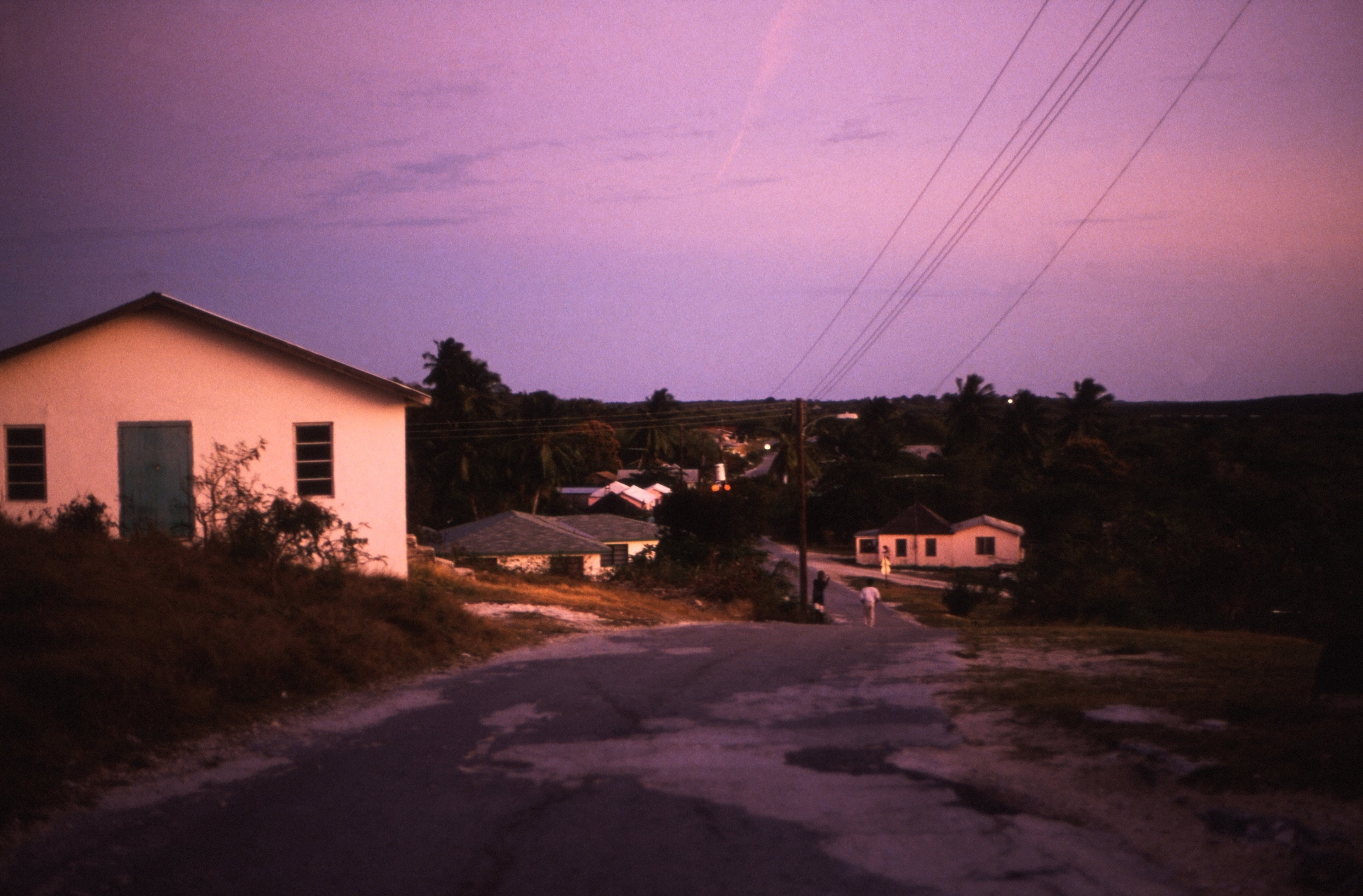 Abends in George Town auf Great Exuma .